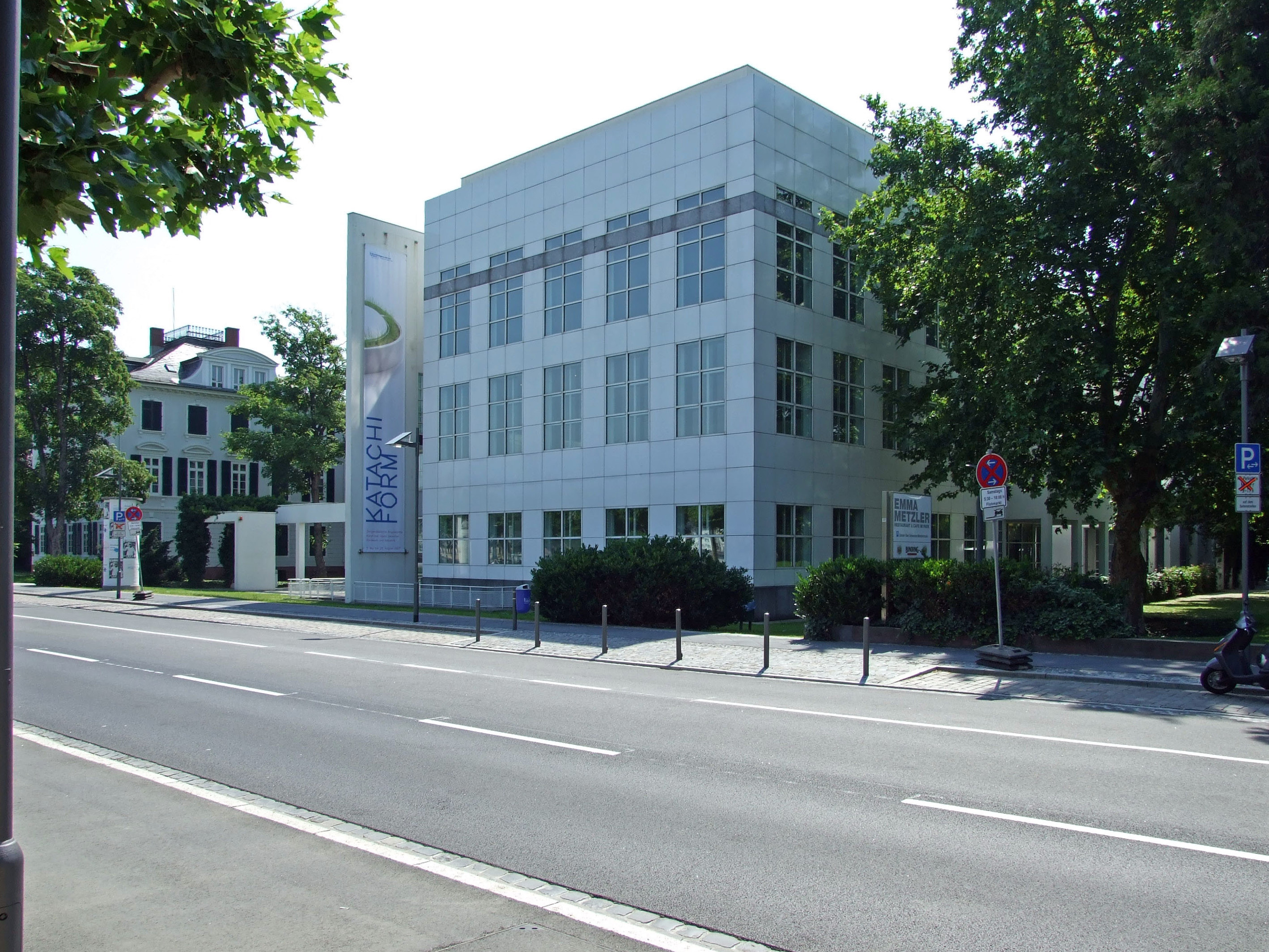 Museum für Angewandte Kunst, Villa Metzler und Neubau von Richard Meier (Architekt)